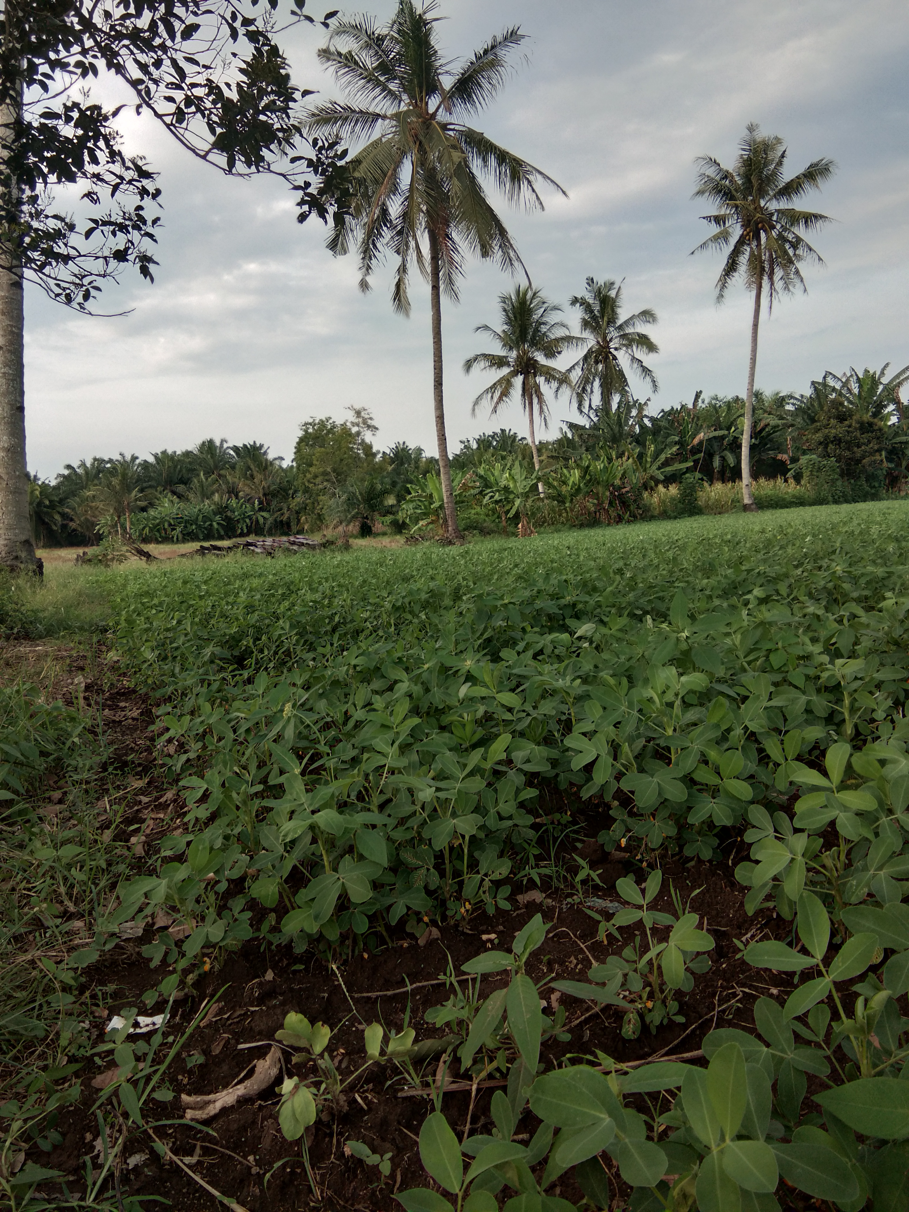 Areal Kebun Kacang Tanah Milik Warga Setempat - 2019